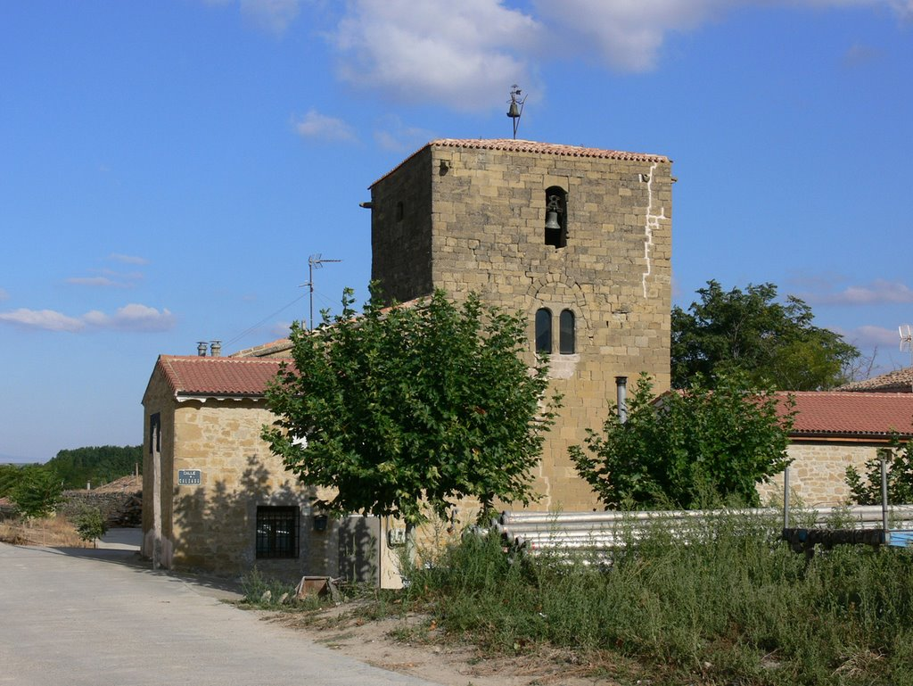 Iglesia de la Asunción en Villalobar de Rioja, (España)